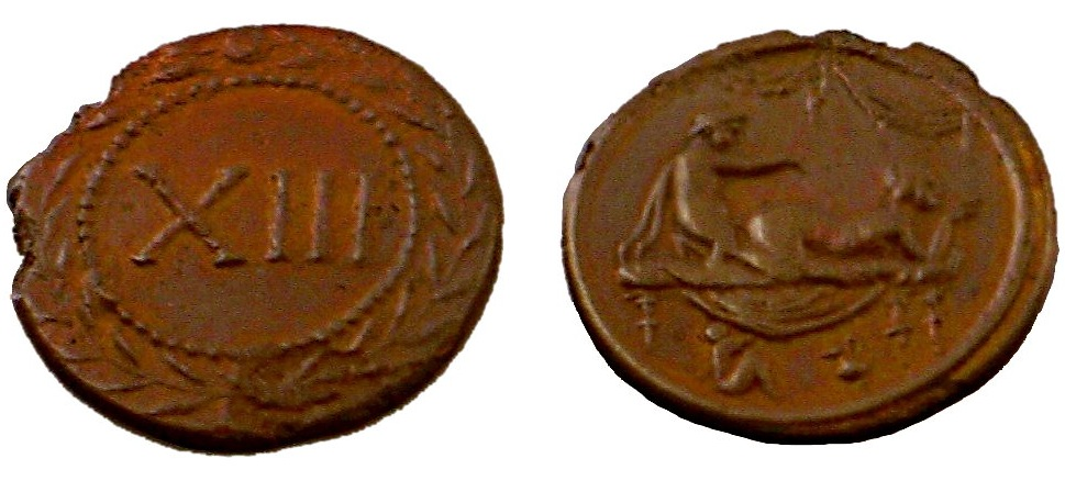 Spintriae